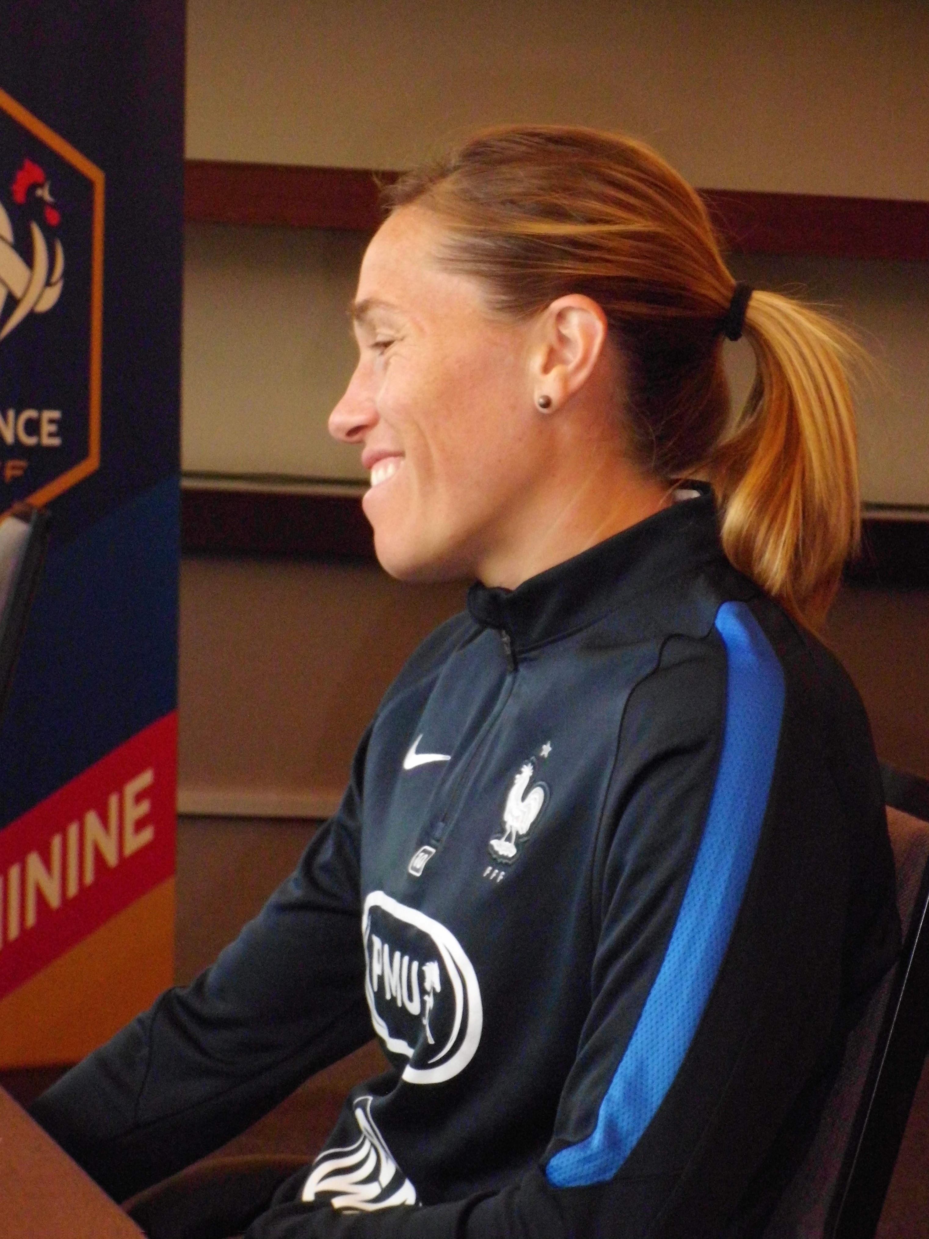 Camille Abily im Zwijndrechter Teamhotel bei einem Pressegespräch während der EM 2017